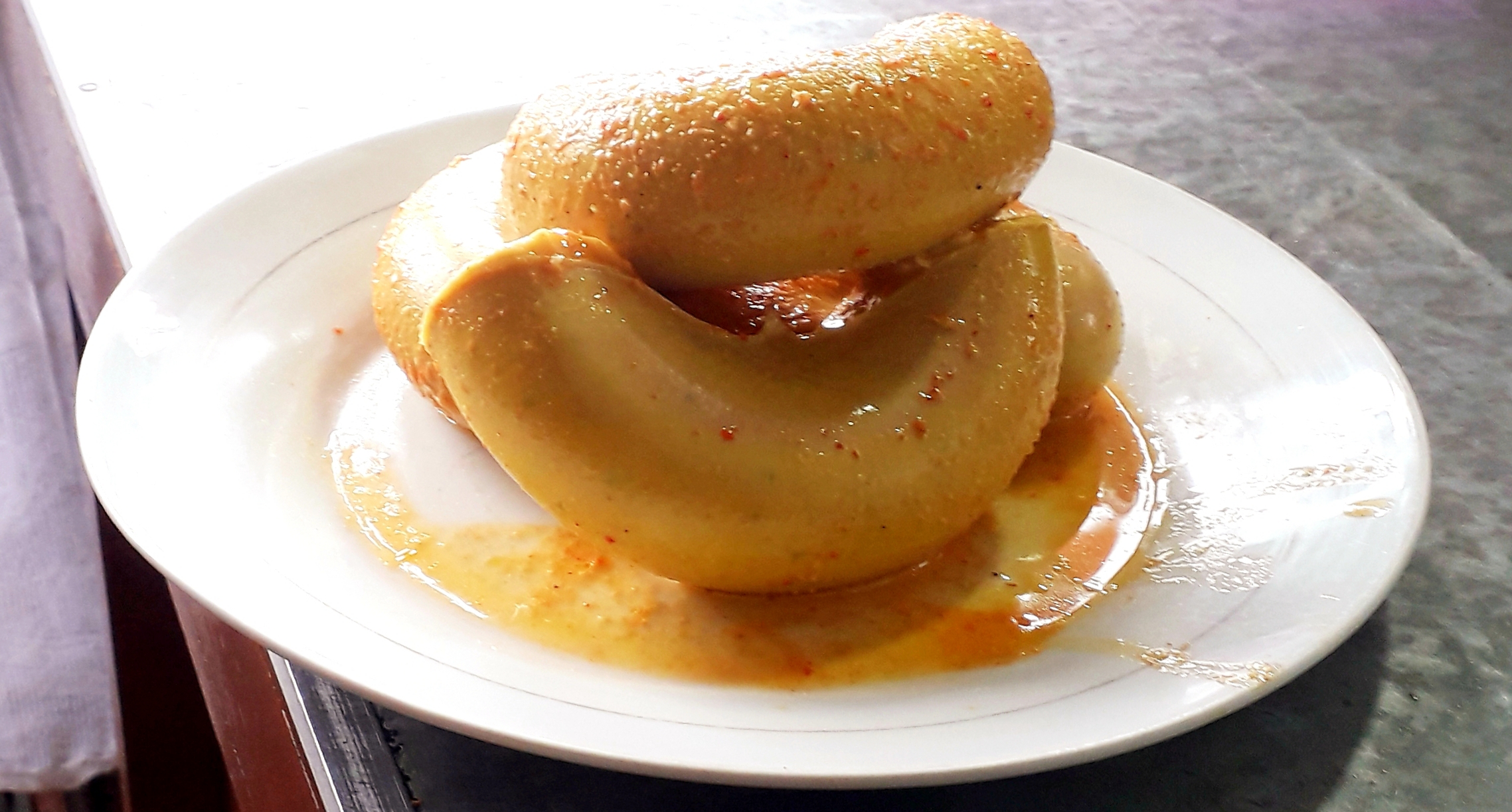 Tambusu berbentuk seperti sosis besar, berkulit usus sapi, dan berisikan telur berbumbu pas untuk jadi santapan.